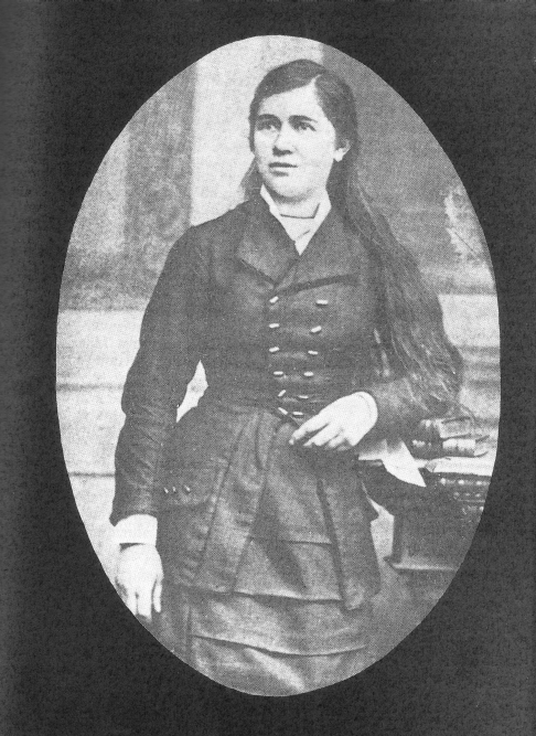 Anna Pammrová, česká filosofka a feministka